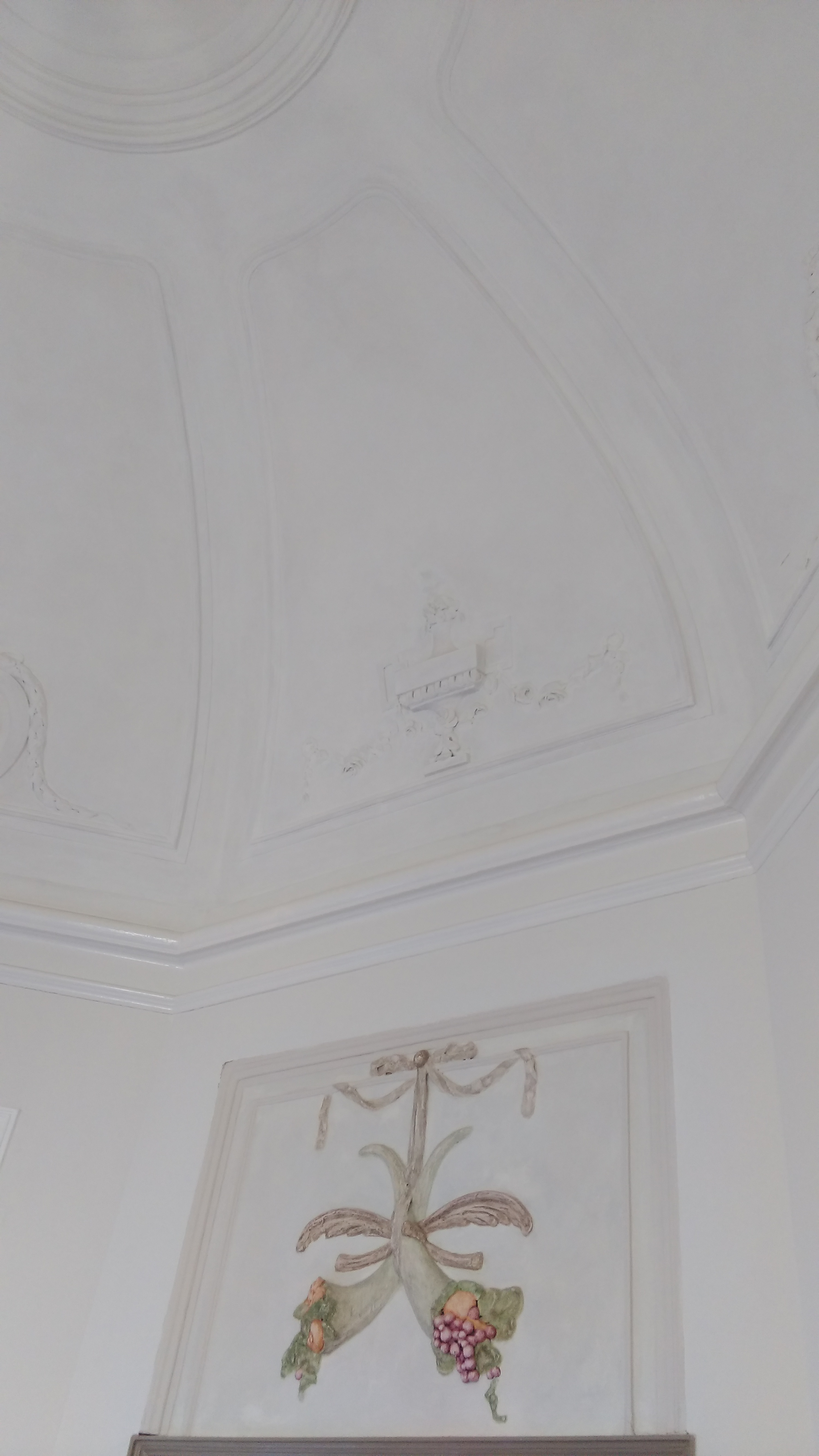 Theekoepel Hereweg 2 te Groningen, detail binnenzijde koepelplafond